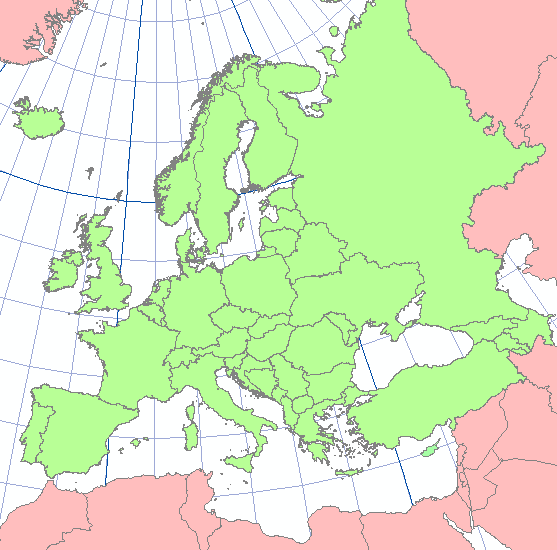 Projectie-voorbeeld, zie verder titel van bestand, waarin is opgenomen het gebied plus de projectiegegevens